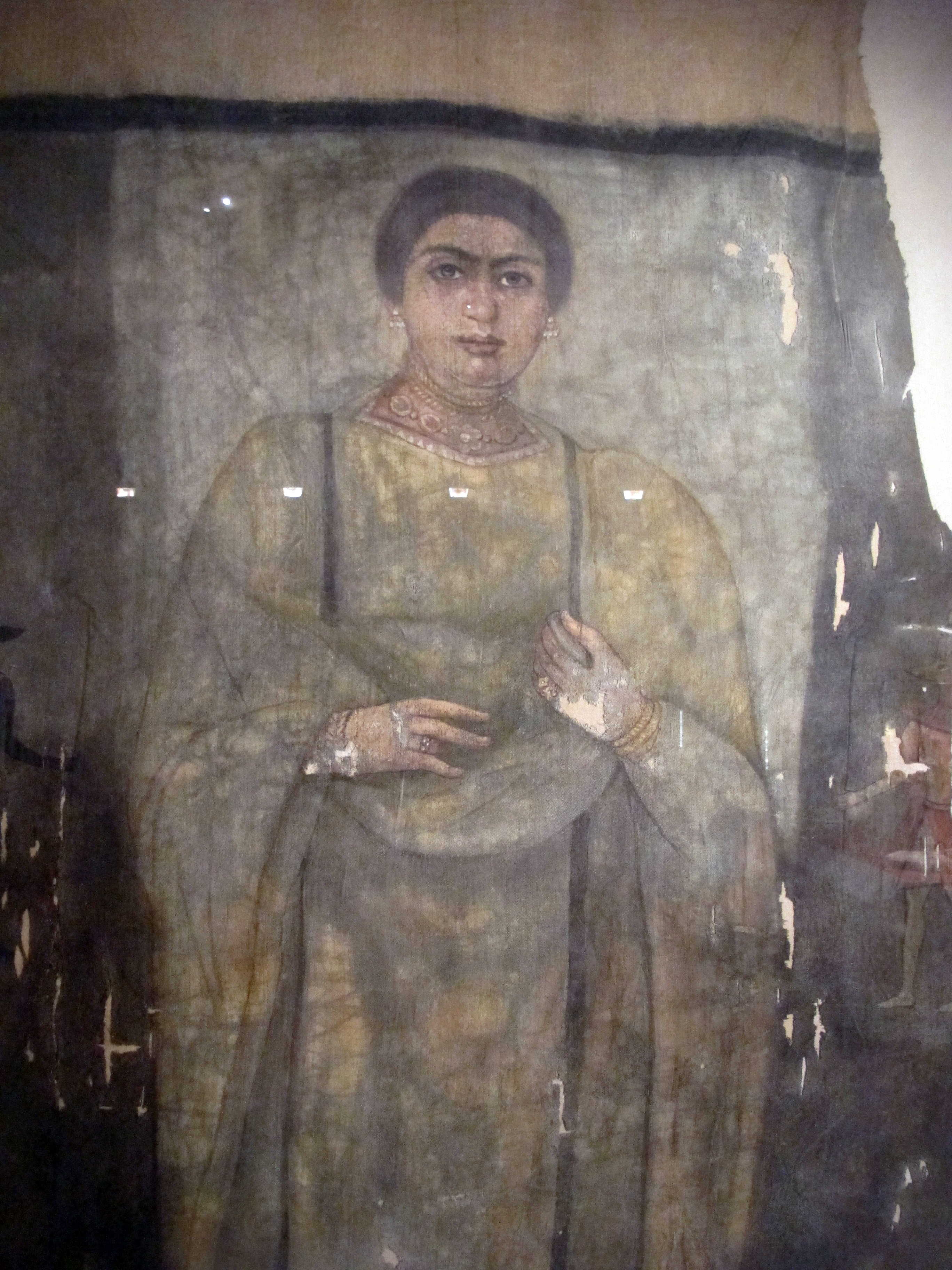 Collezione del Metropolitan Museum, NYC